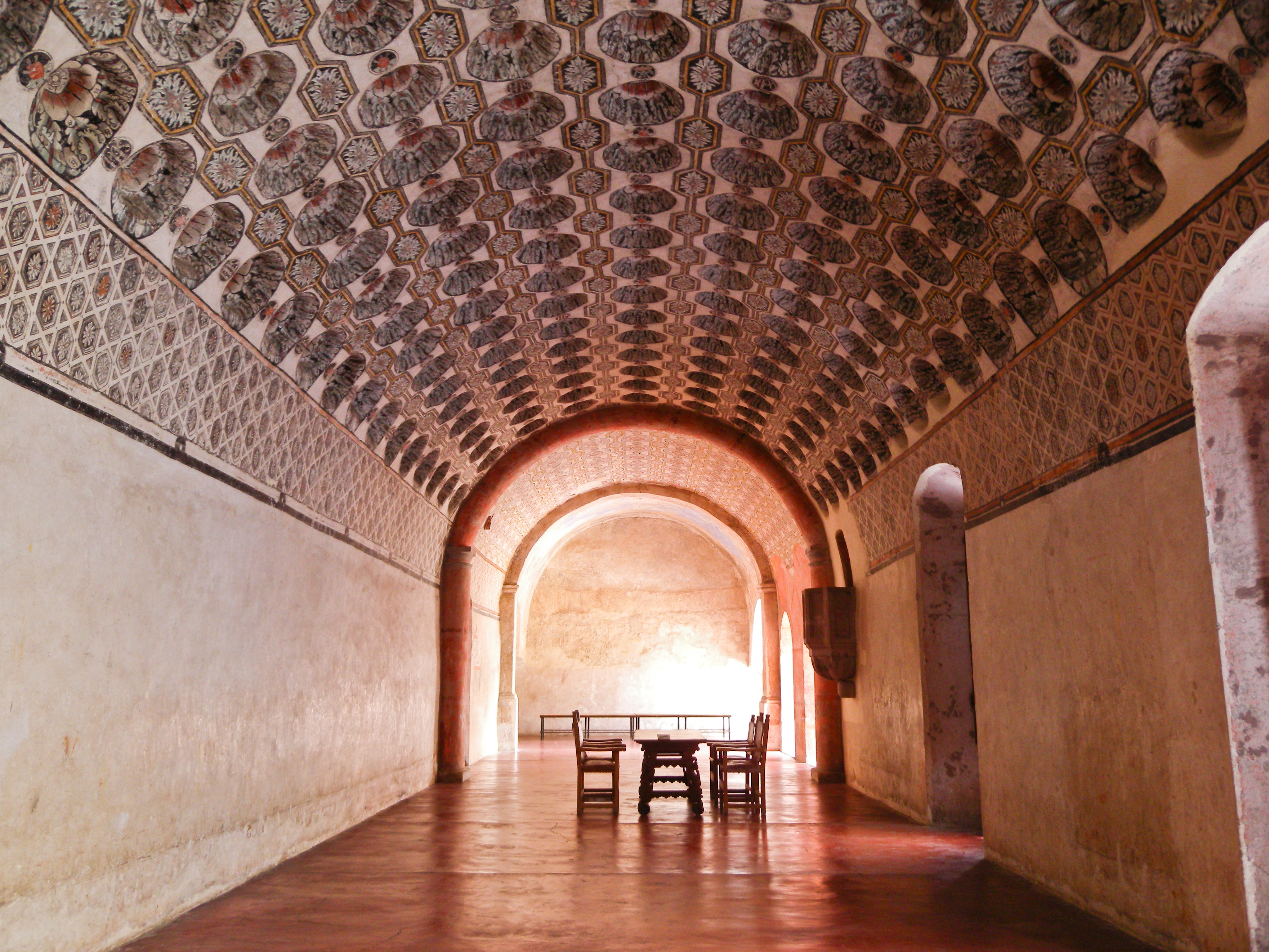 Convento de Actopan, Hidalgo.